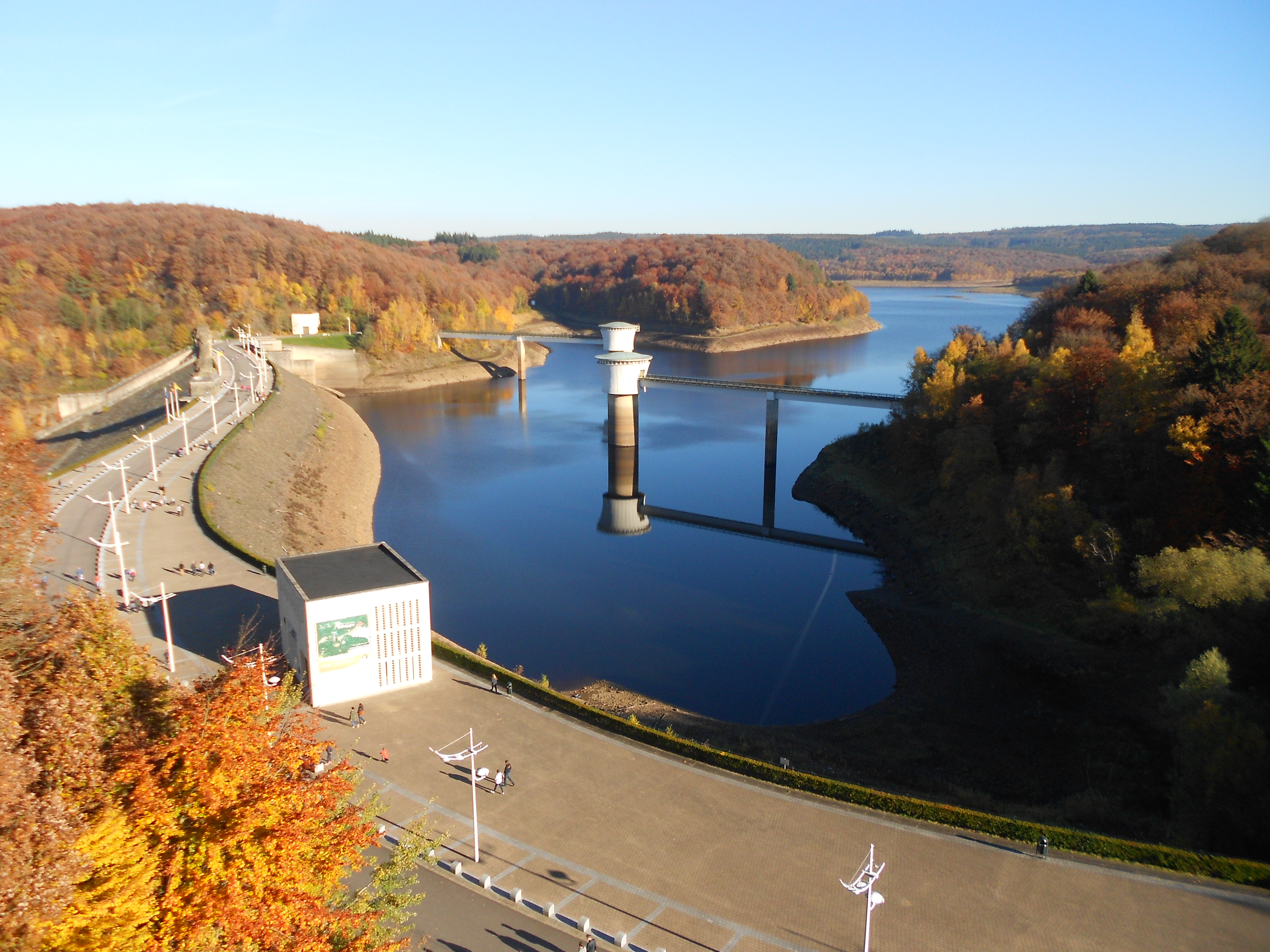 De Gileppestuwdam.